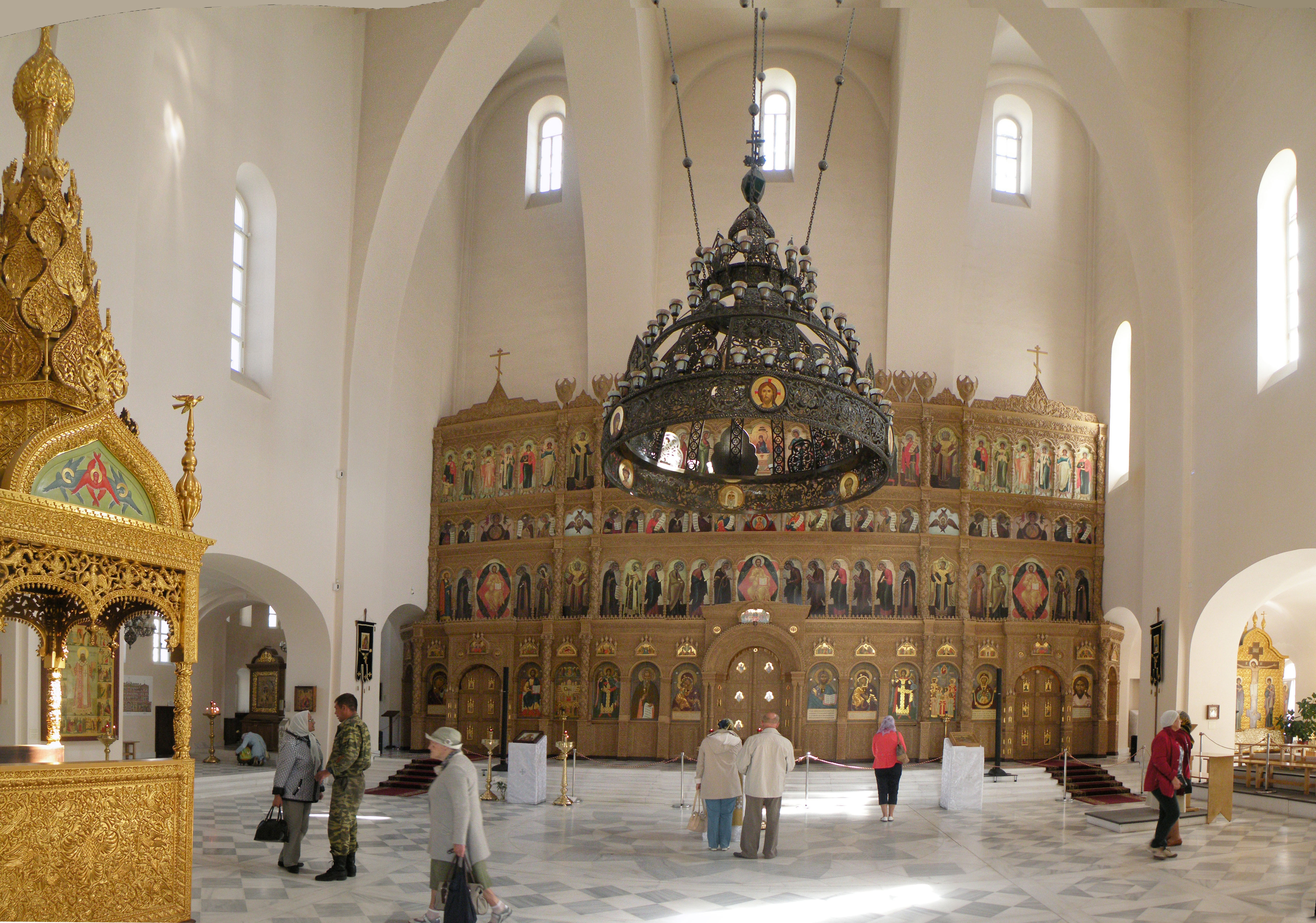 Собор Фёдоровской иконы Божией Матери Алтарь верхней церкви